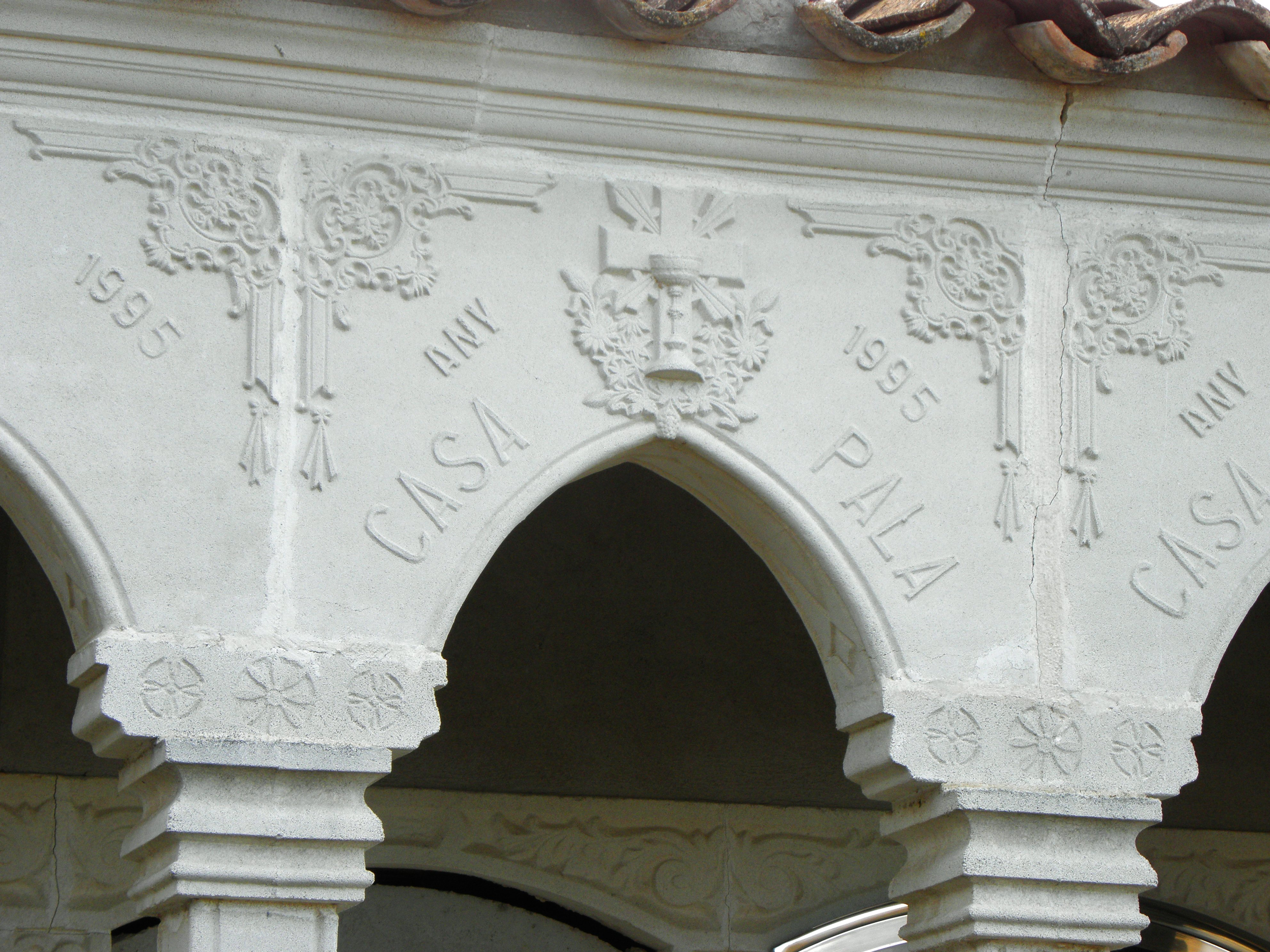 Prades de la Molsosa (La Molsosa, Solsonès)Detall d'una de les arcades del cementiri nou.